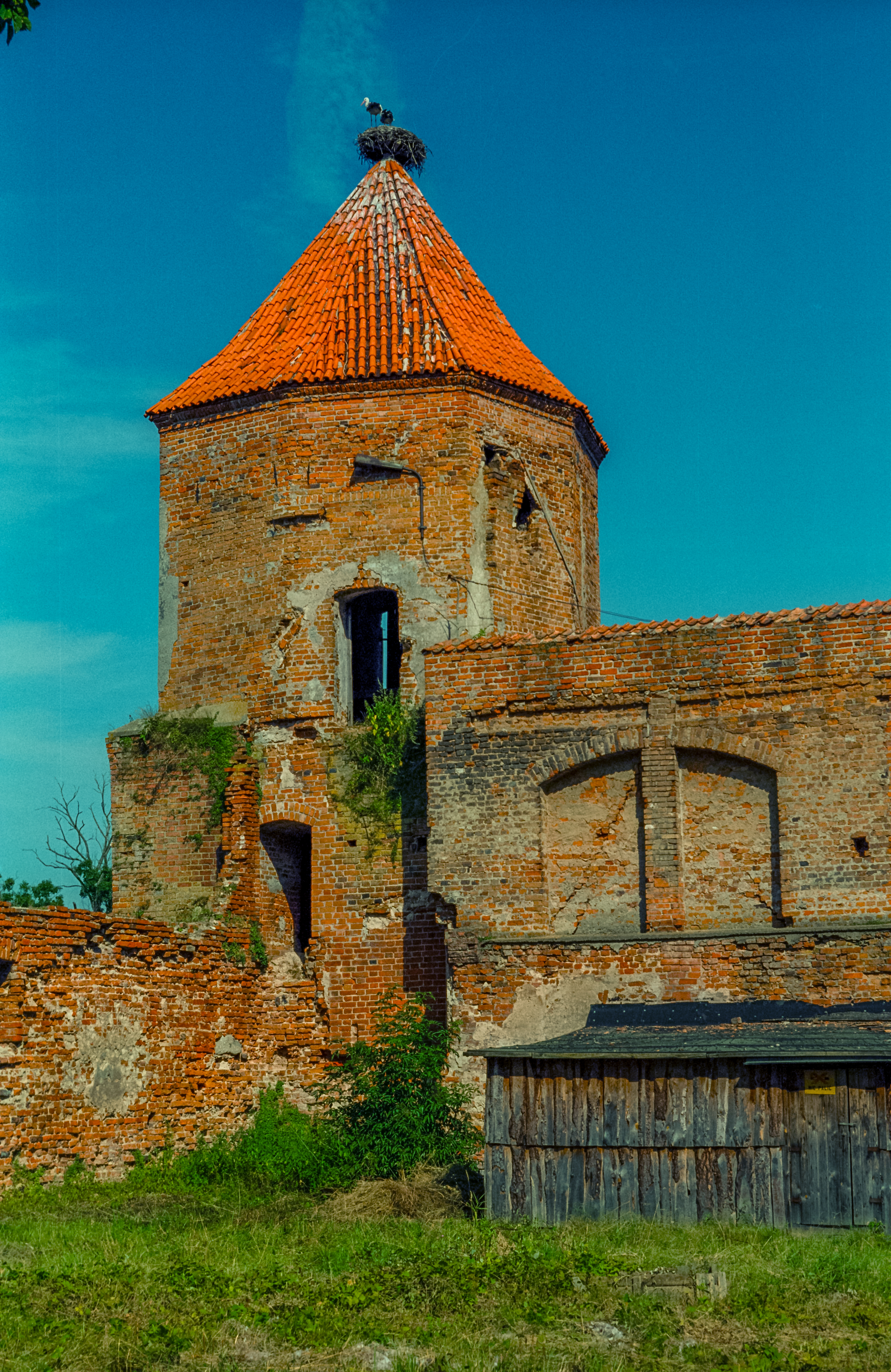 Szymbark Castle